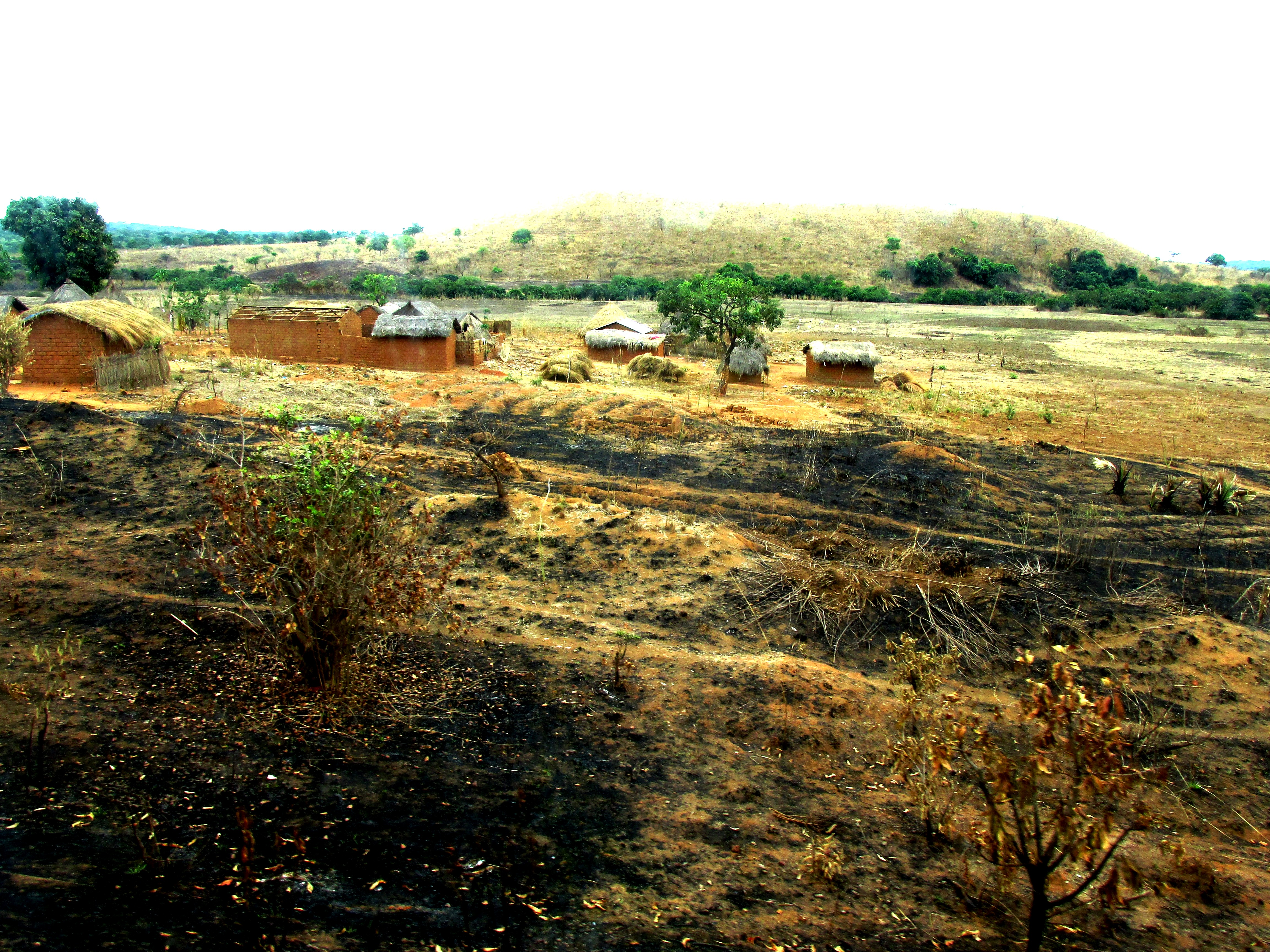 Village BAWA au Nord du Cameroun en saison sèche.